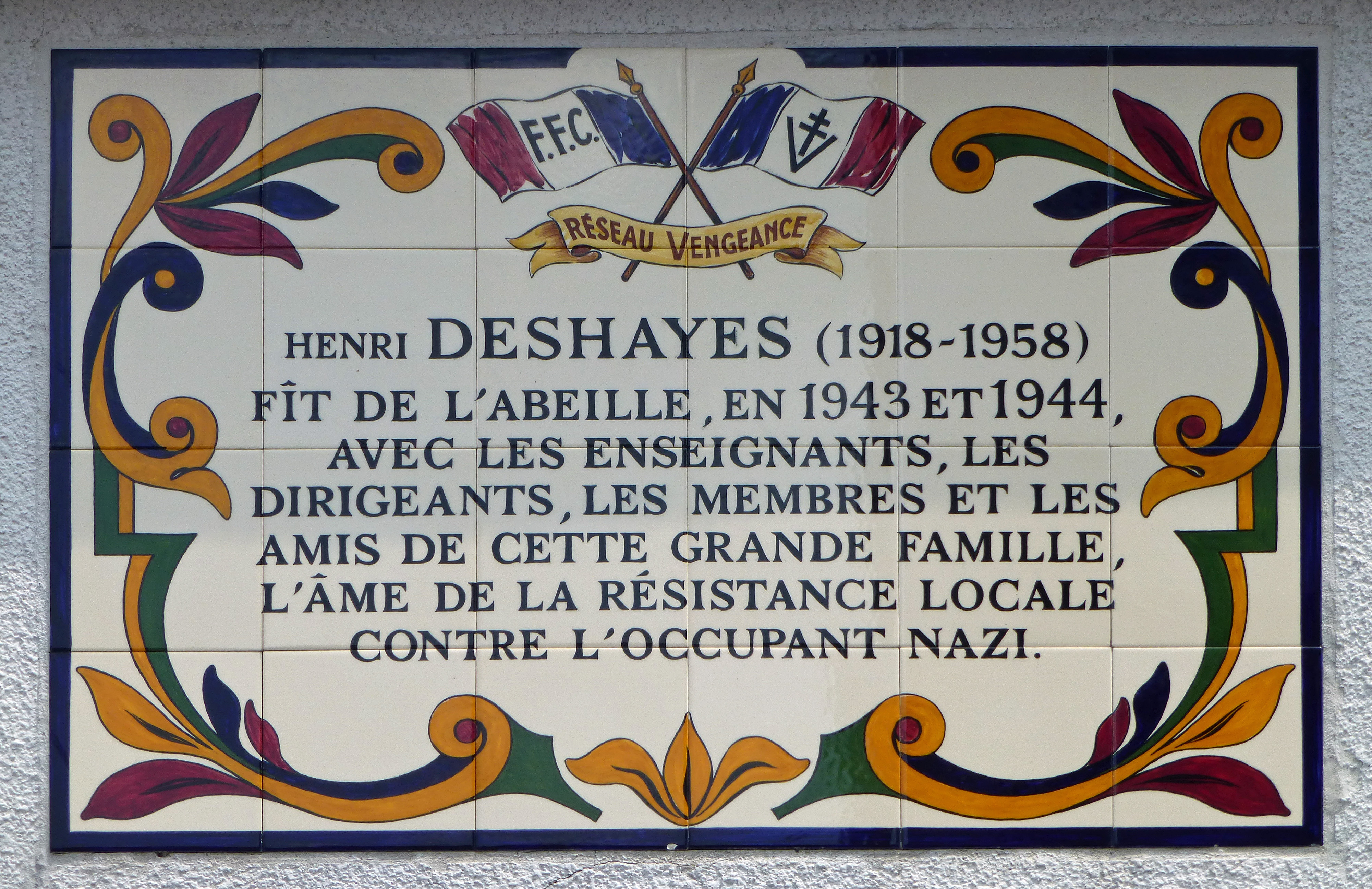 Gien (Loiret), 12 rue Clemenceau : plaque à la mémoire d'Henri Deshayes (réseau Vengeance)